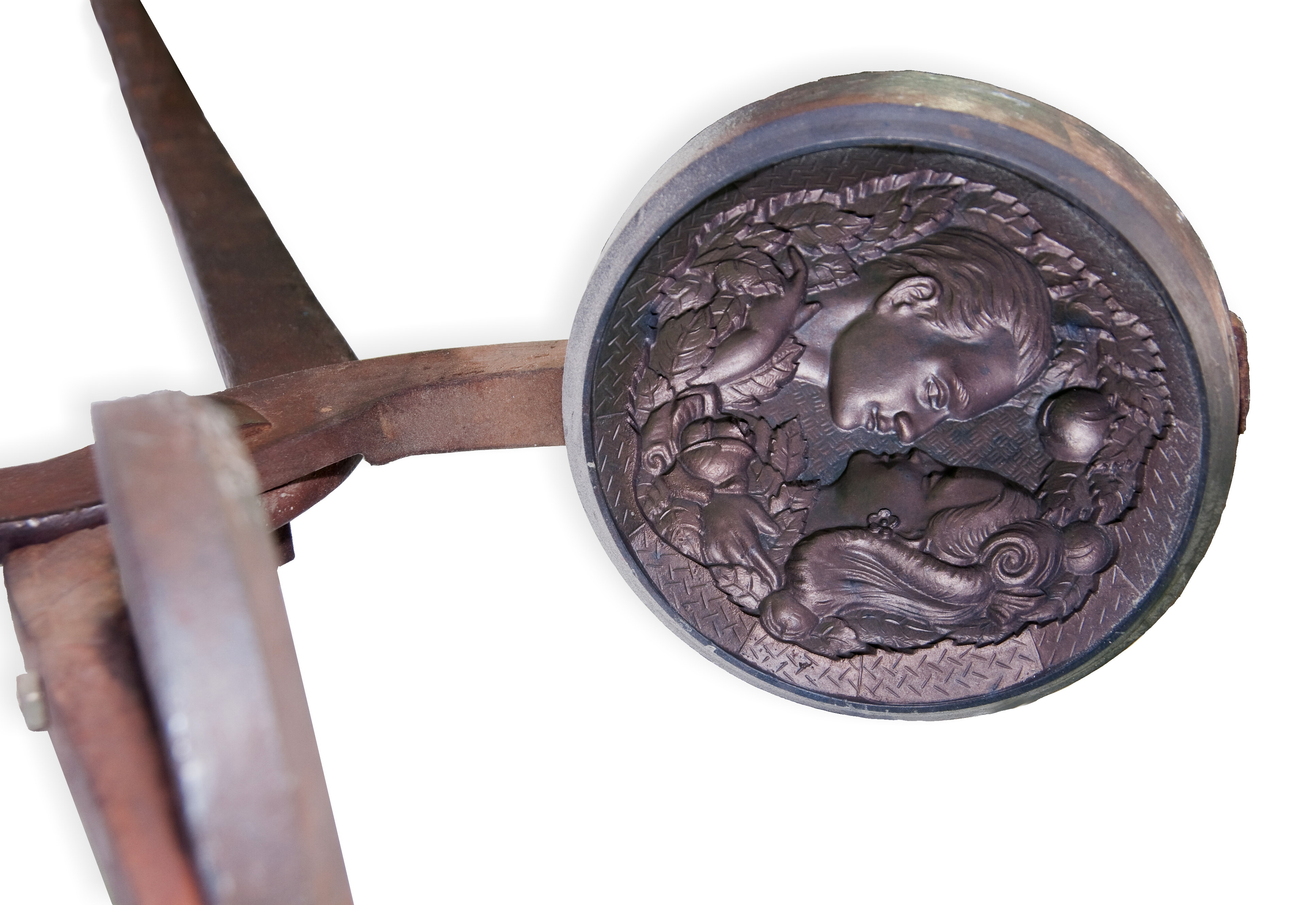 Detail formy ve tvaru kleští. Sklárna Nenačovice, okres Beroun. This picture was taken and/or got within the scope of the 'Acquiring scientific and specialized pictures' grant.